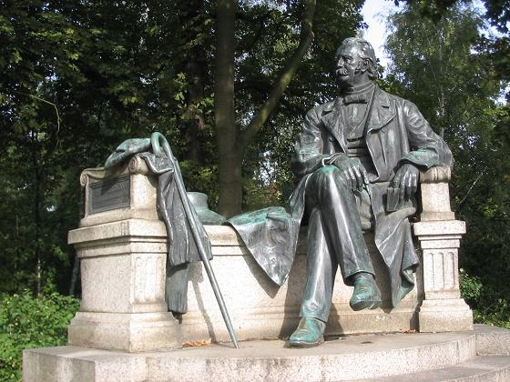 Denkmal Theodor Fontane, Neuruppin – Das Denkmal wurde nach Entwürfen von Max Wiese errichtet, ebenso wie das Neuruppiner Denkmal für Karl Friedrich Schinkel (* 1781; † 1841), der gleichfalls in Neuruppin geboren wurde.